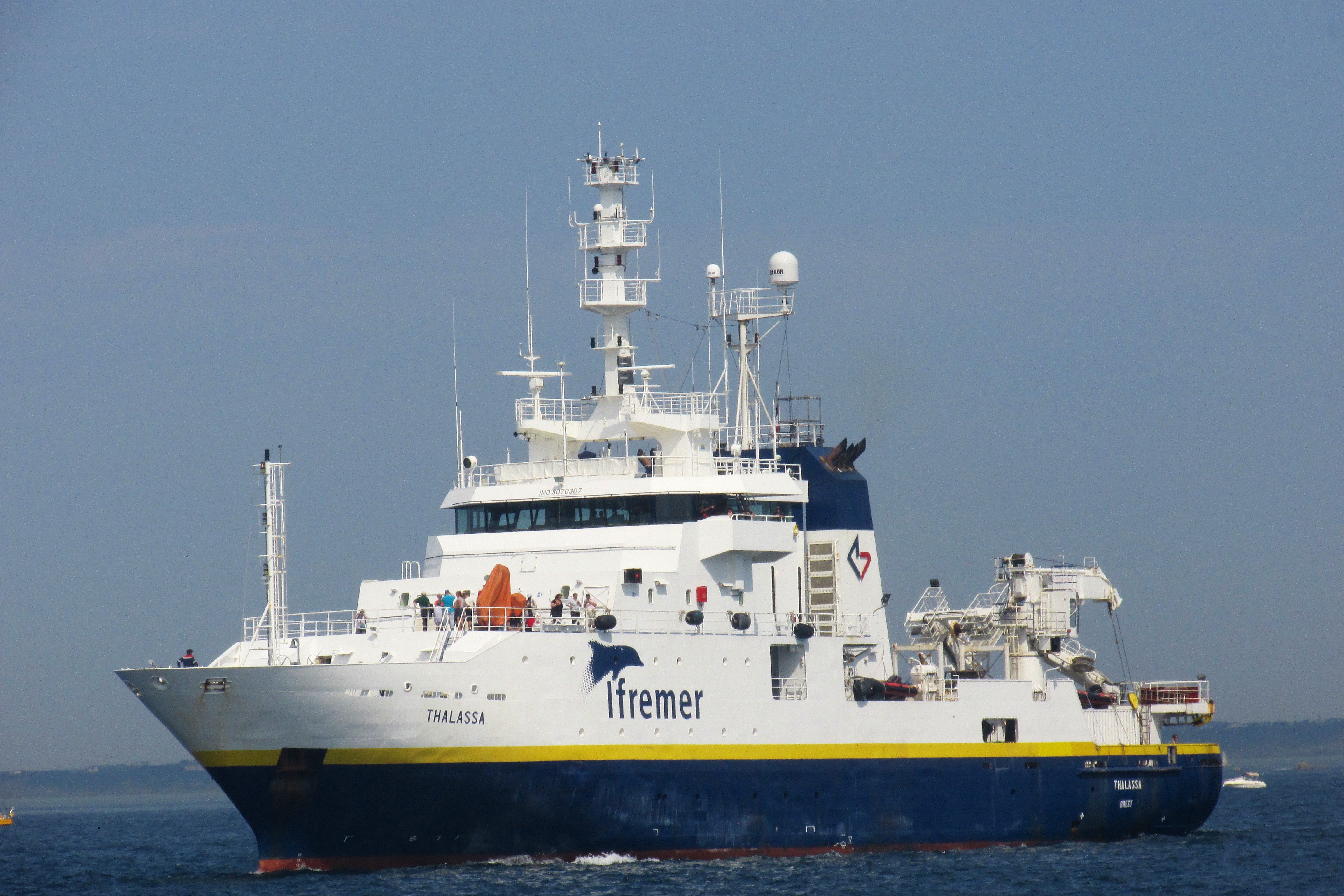 N/O Thalassa